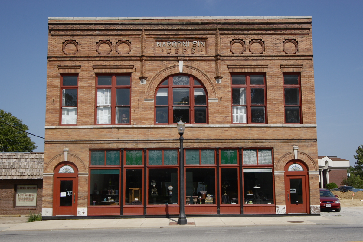 Narodni Sin, Edwardsville, Illinois